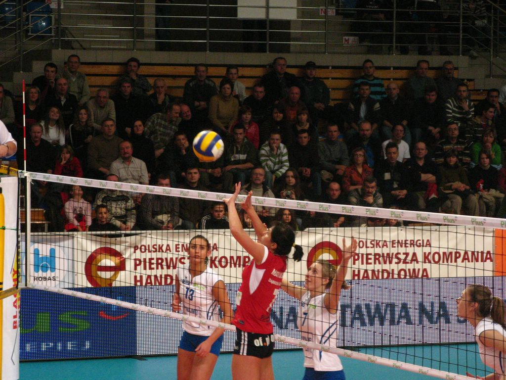 Mecz MKS Dąbrowa Górnicza vs. AZS AWF Poznań, 2007-11-30.